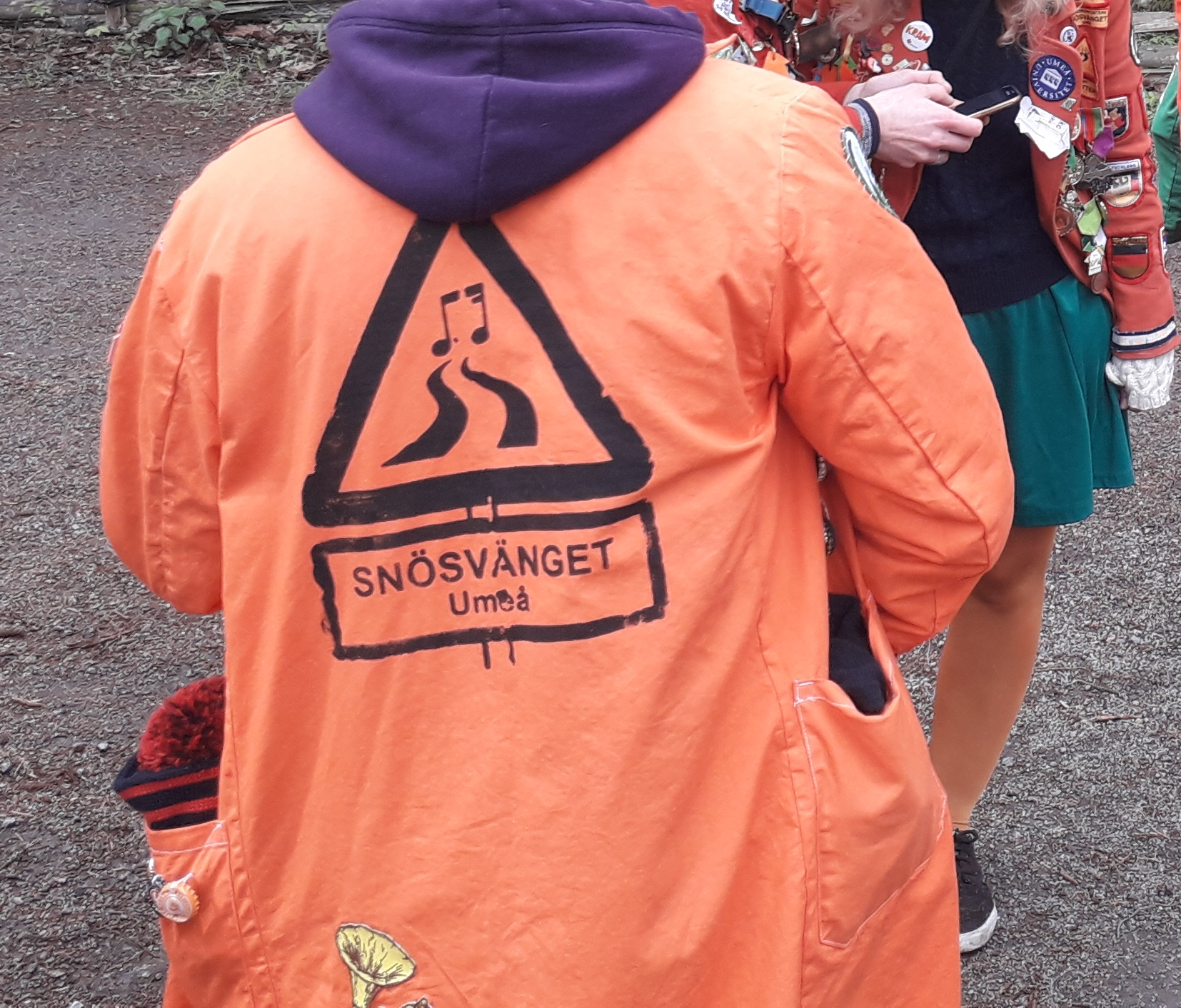 En medlem i Studentorkestern Snösvänget poserar med sin orangea rock, där loggan, liknandes en vägskylt, kan ses. I bakgrunden en annan orkestermedlem, också med orange rock, och grön underdel i form av en kjol.